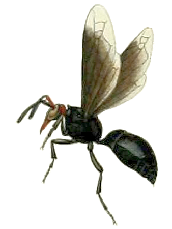 Monobia apicalipennis